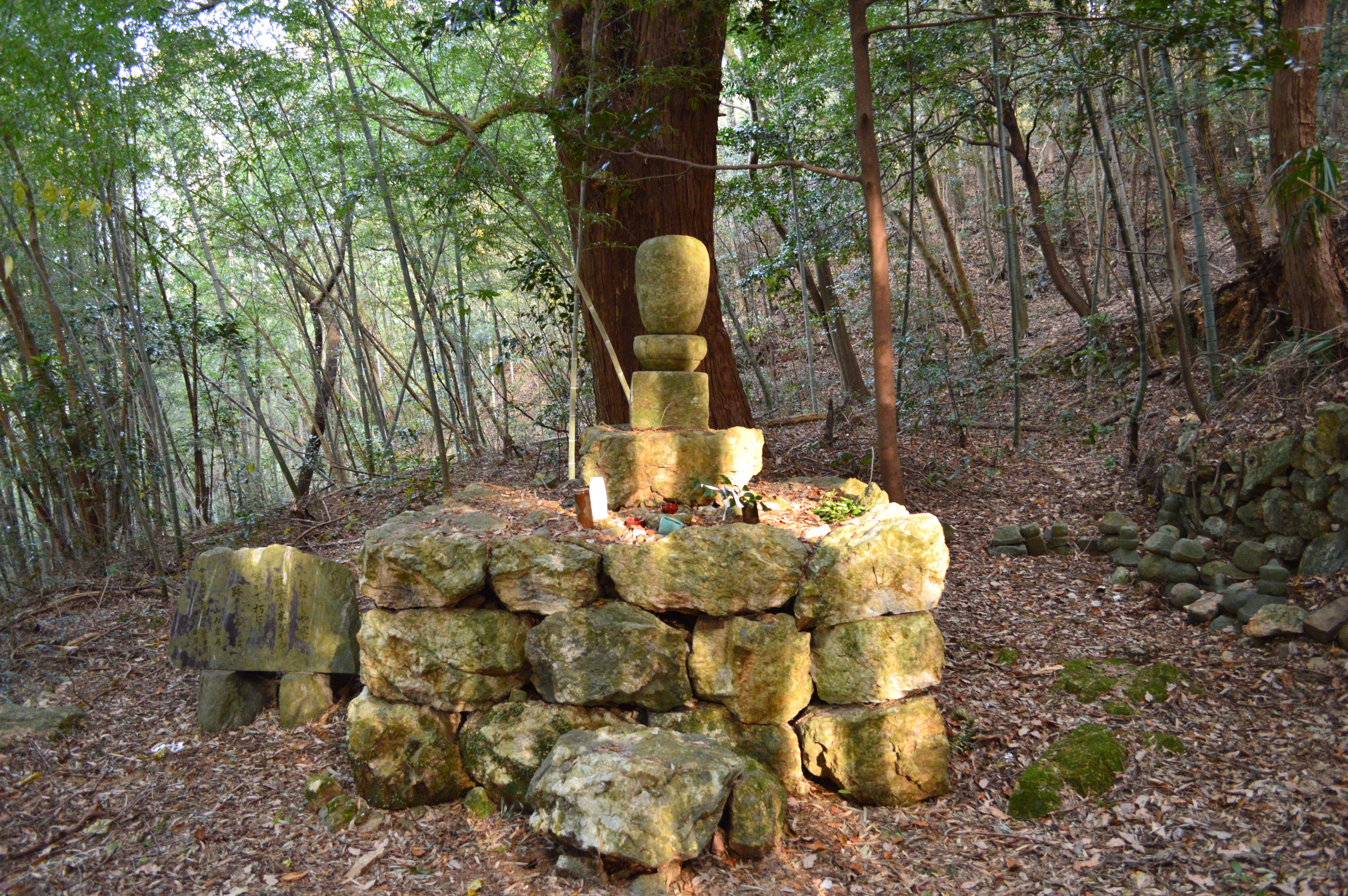 西養寺跡無縫塔 (伝源希義墓塔)